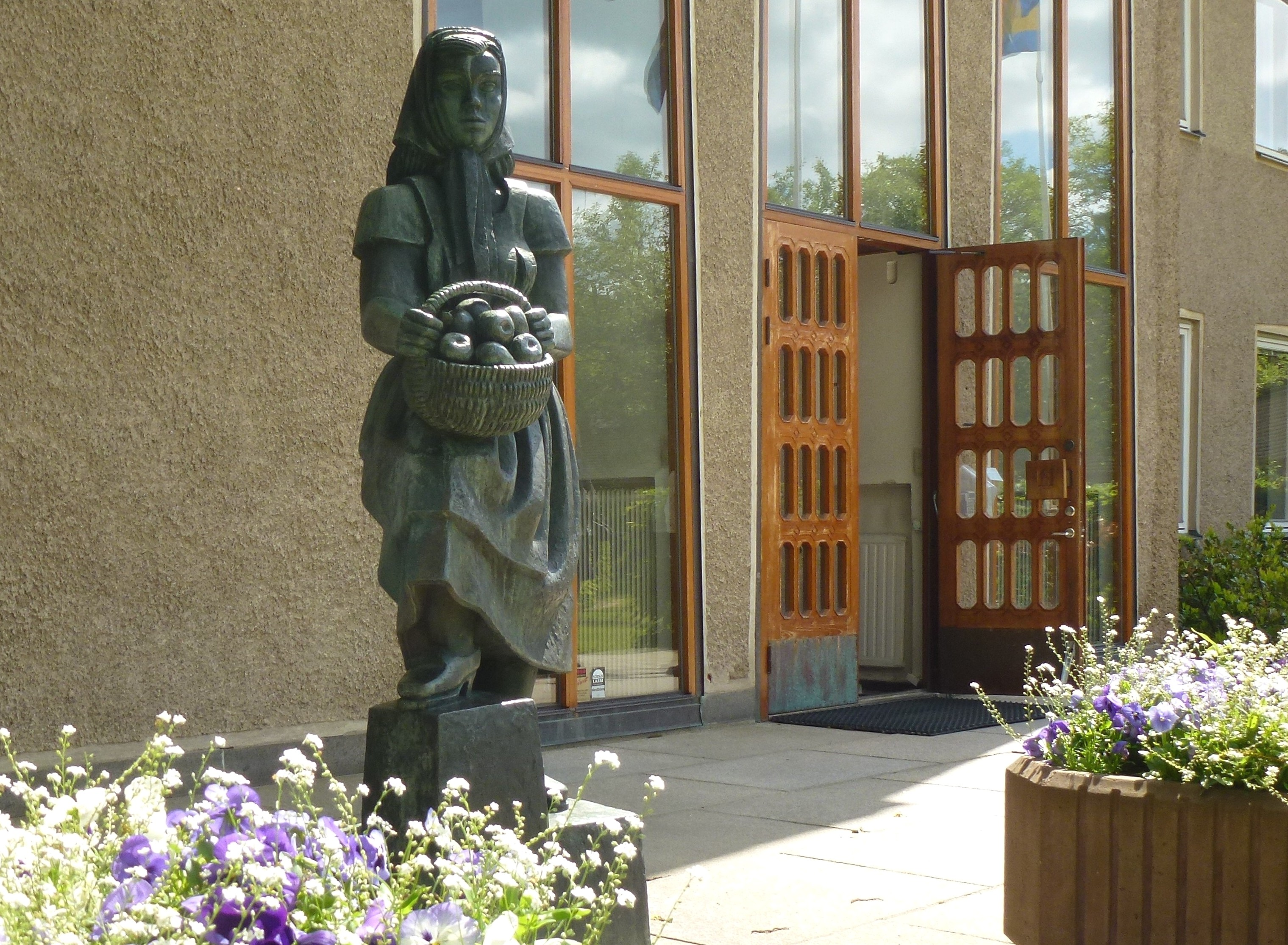 Huddinge kommunalhus, entré